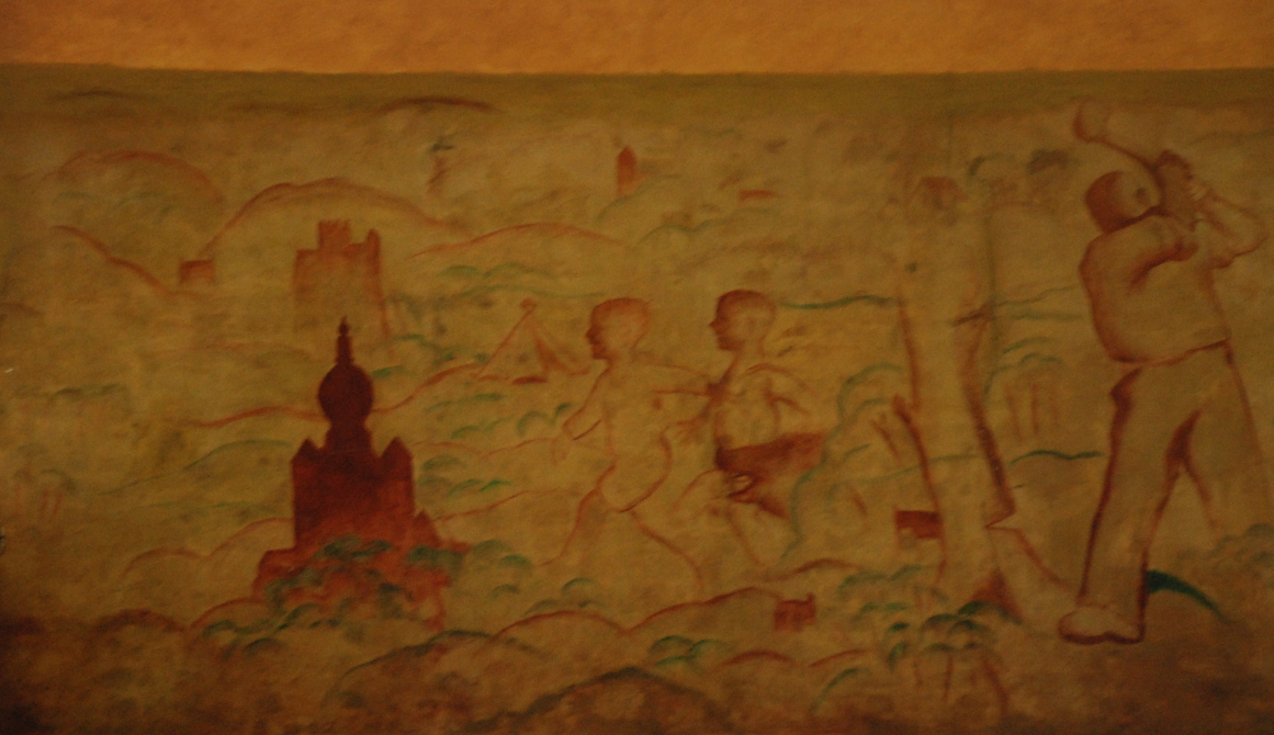 wandschiliderij in de lokettenzaal van het station te Brugge